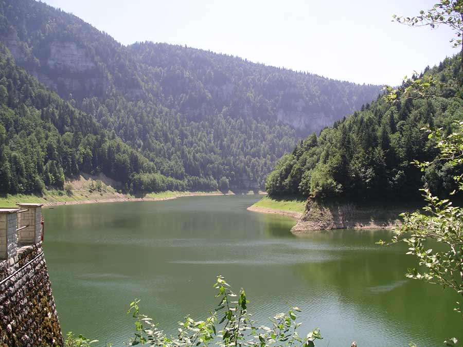 Le lac de Moron, à la frontière entre la France et la Suisse